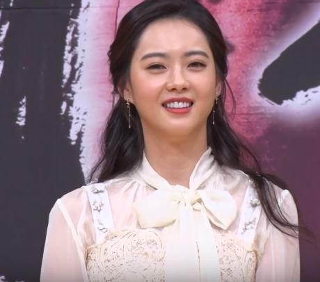 11일 오전 서울 목동SBS에서 SBS 월화드라마 ‘해치’ 제작발표회가 열렸다.